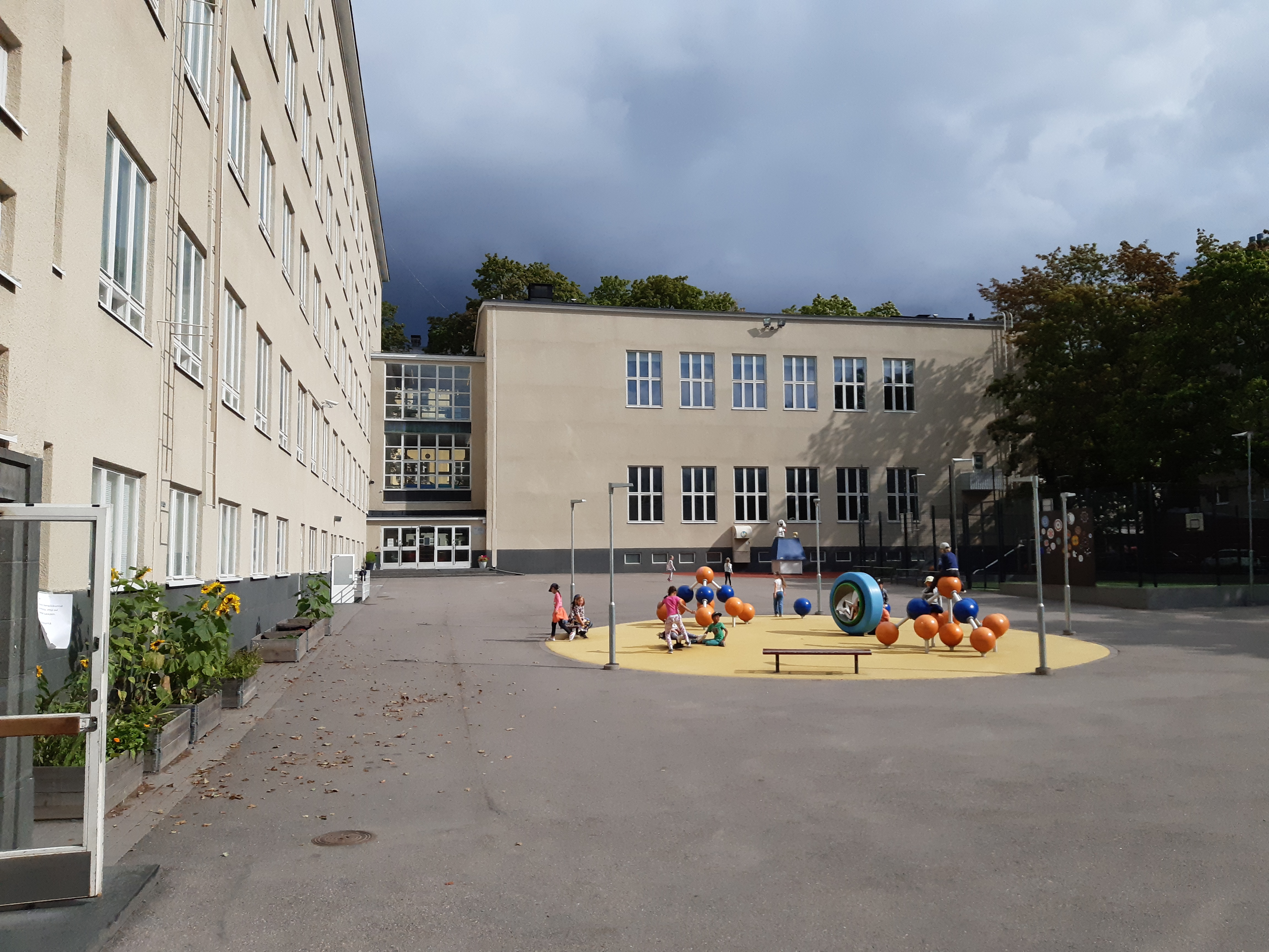 Koulun pihalta